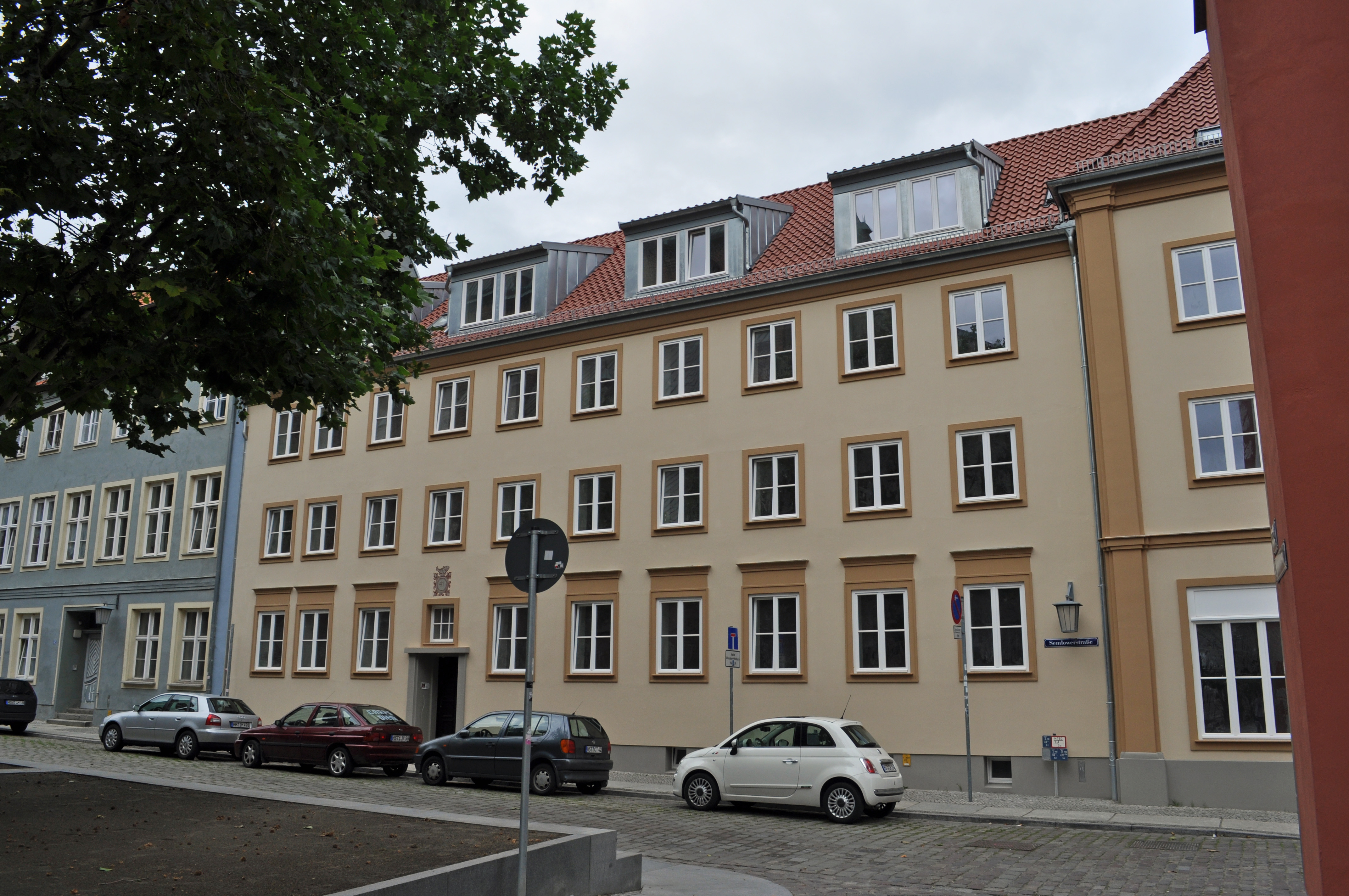 Stralsund, Semlower Straße 41 (2012-09-15), by Klugschnacker in Wikipedia